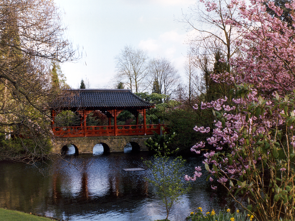 Japanischer Garten Leverkusen